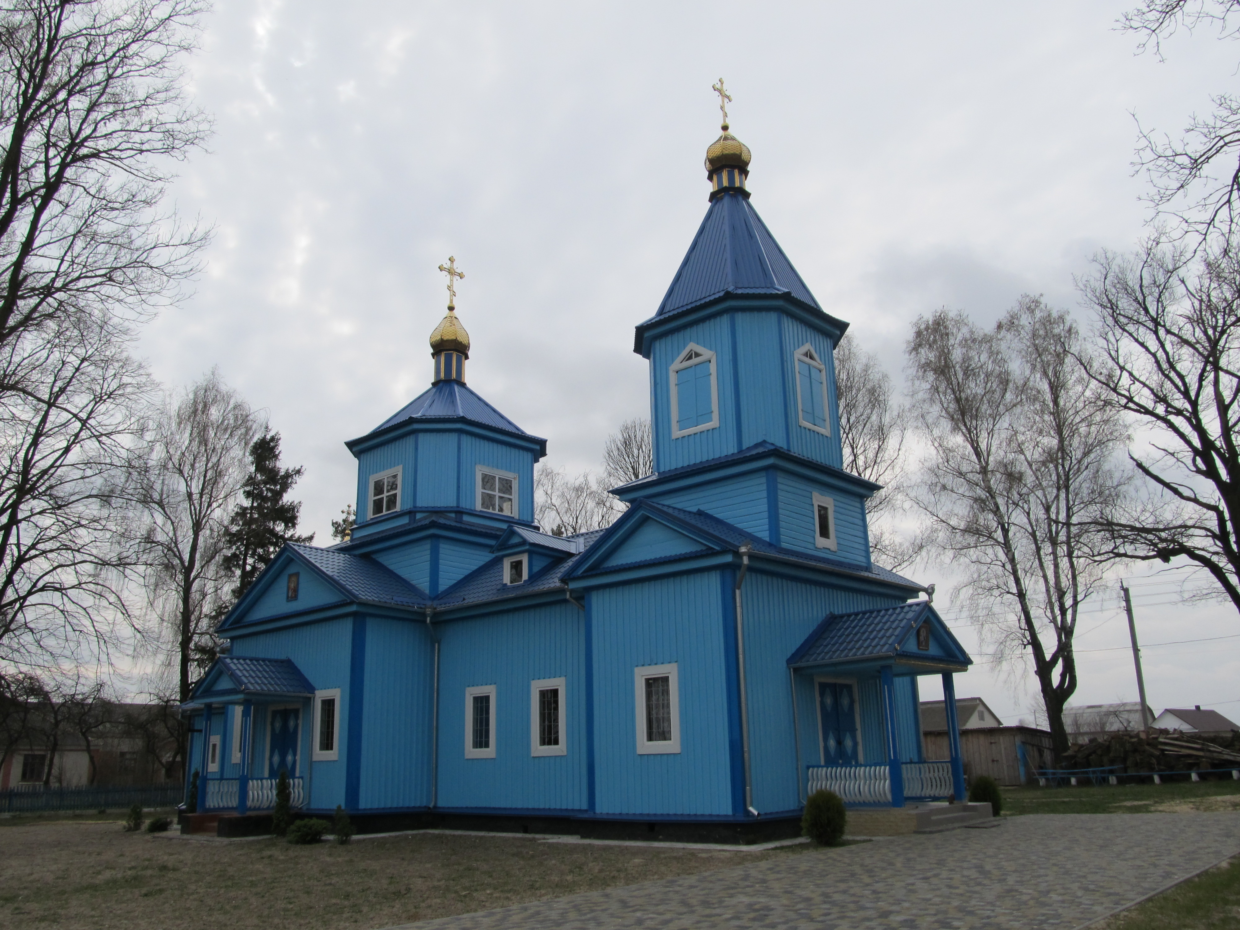 Свято-Миколаївська Церква с. Мирне